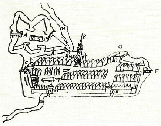 Plan en perspective cavalière de la ville close de Morlaix (dessin de François-Nicolas Baudot Dubuisson-Aubenay datant de 1636) ; c'est le plus ancien plan connu de la ville intra-muros de Morlaix ; on y voit notamment le château (en A), l'église Notre-Dame-du-Mur (en B), les portes Notre-Dame (en F), de L'Hospital en E), de la Prison (en D) et du Bourret (en G) ainsi que les halles médiévales (vers le bas à gauche du plan).